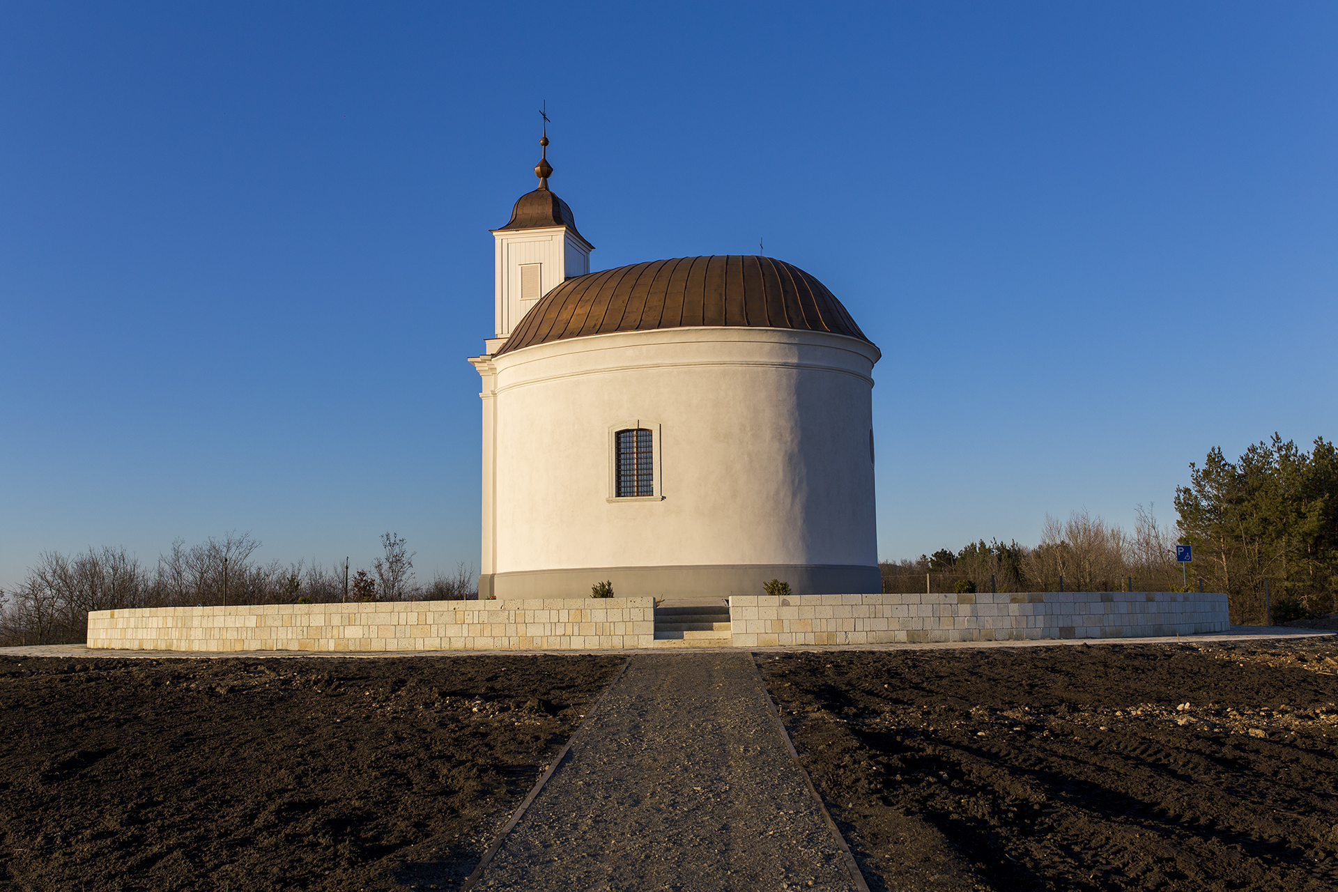 A felújított Szent Teréz-kápolna